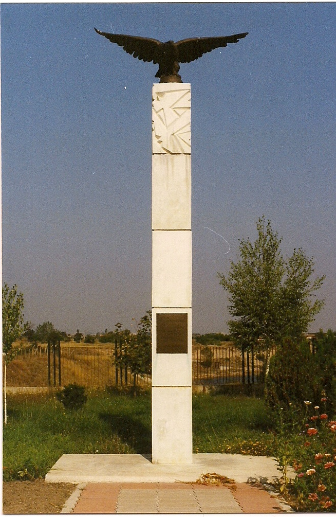 Stele mit Luftwaffen Adler am Eingang des bulgarischen Luftwaffen Museums in Plovdiv Starke Ähnlichkeit mit dem "Adler auf der Weltkugel" der deutschen Luftwaffe im III-Reich